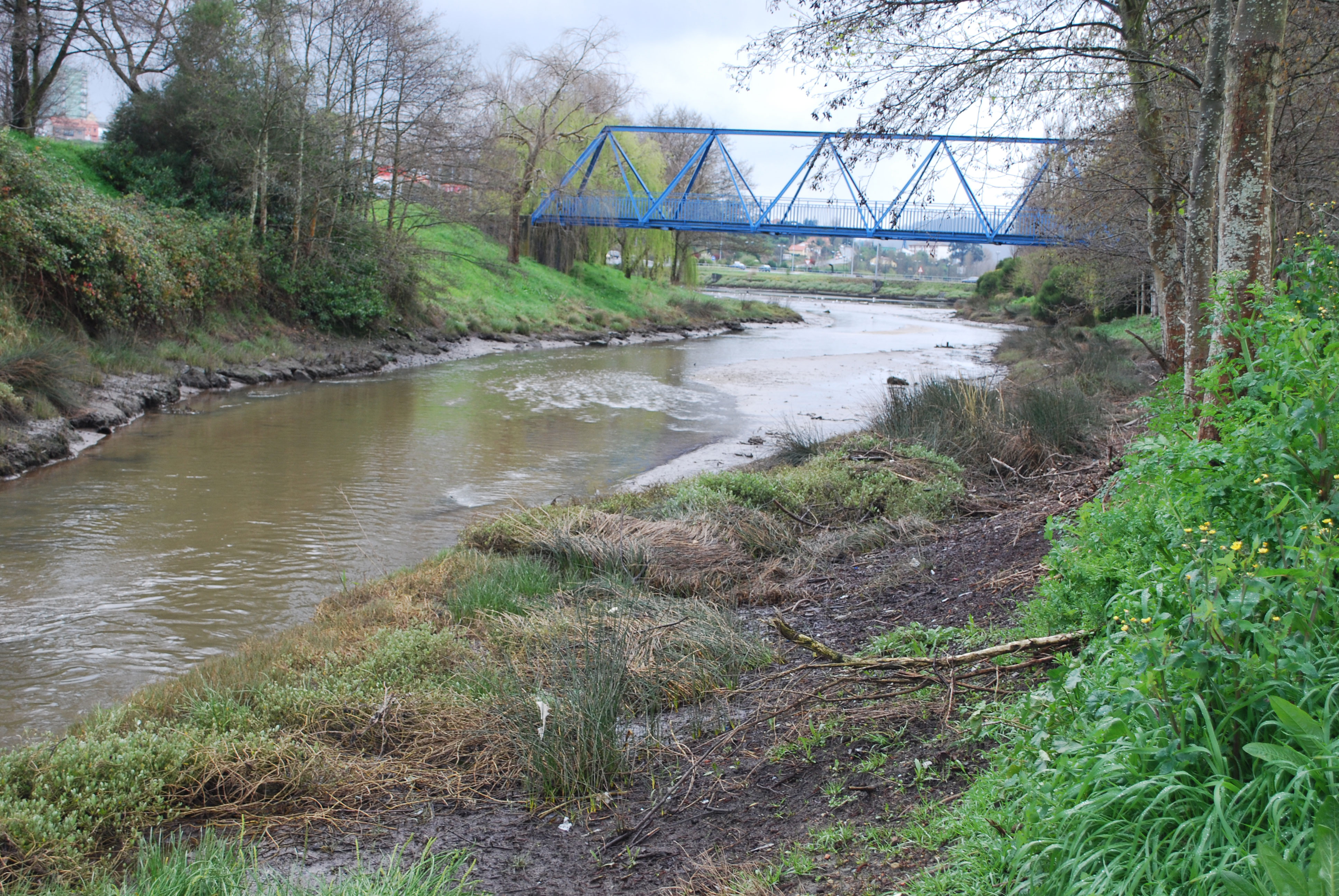 Desenbocadura do río da Sardina en A Malata Ferrol A Coruña Galiza Spain